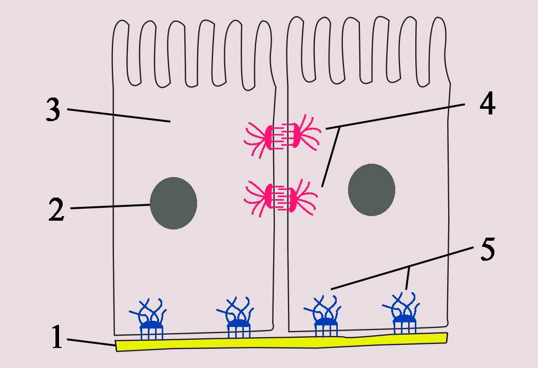 Esquema de una célula. 1. Membrana basal, 2. Núcleo celular, 3. Citoplasma, 4. Desmosoma, 5. Hemidesmosoma.